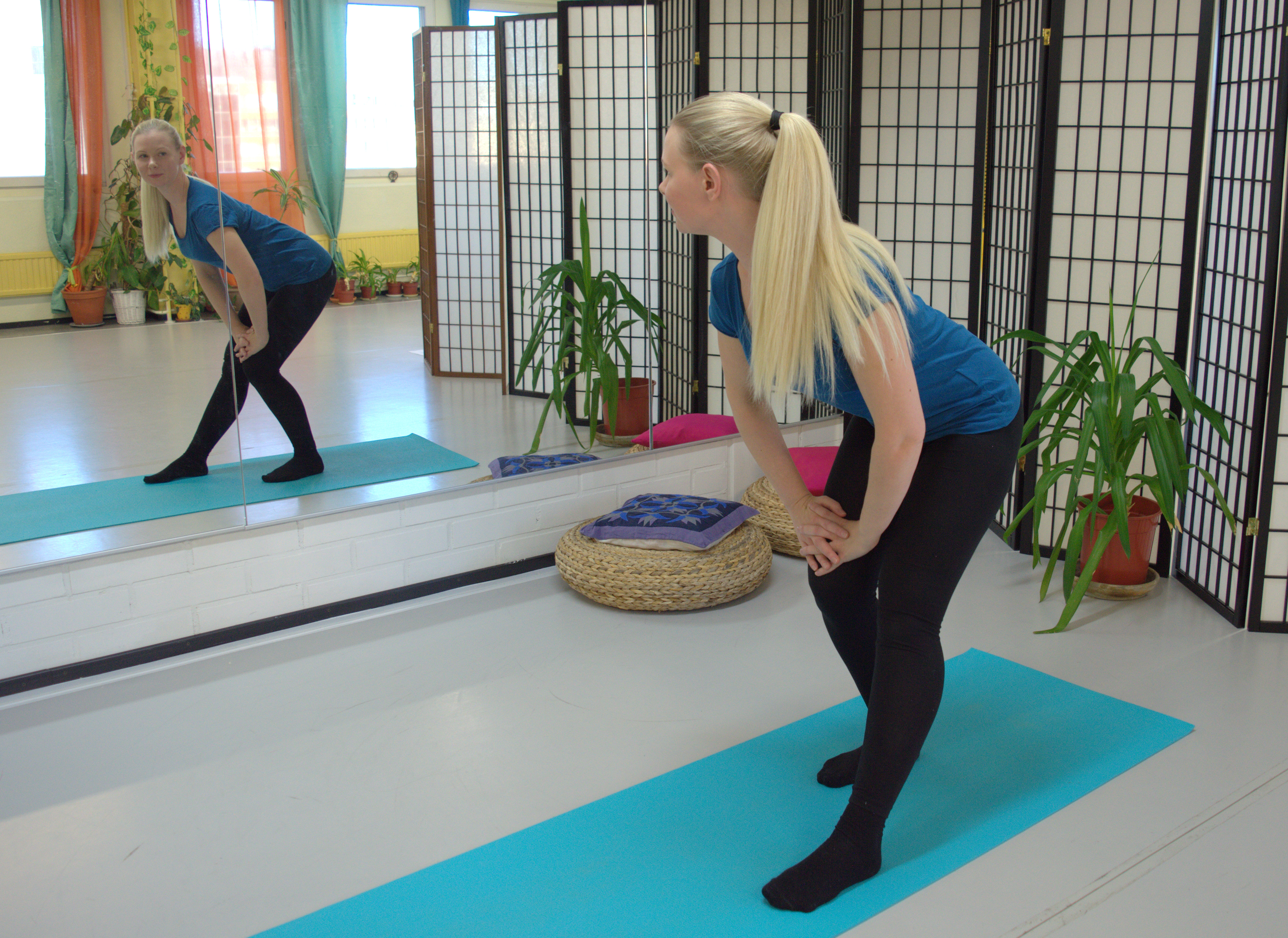 Takareiden venyttely